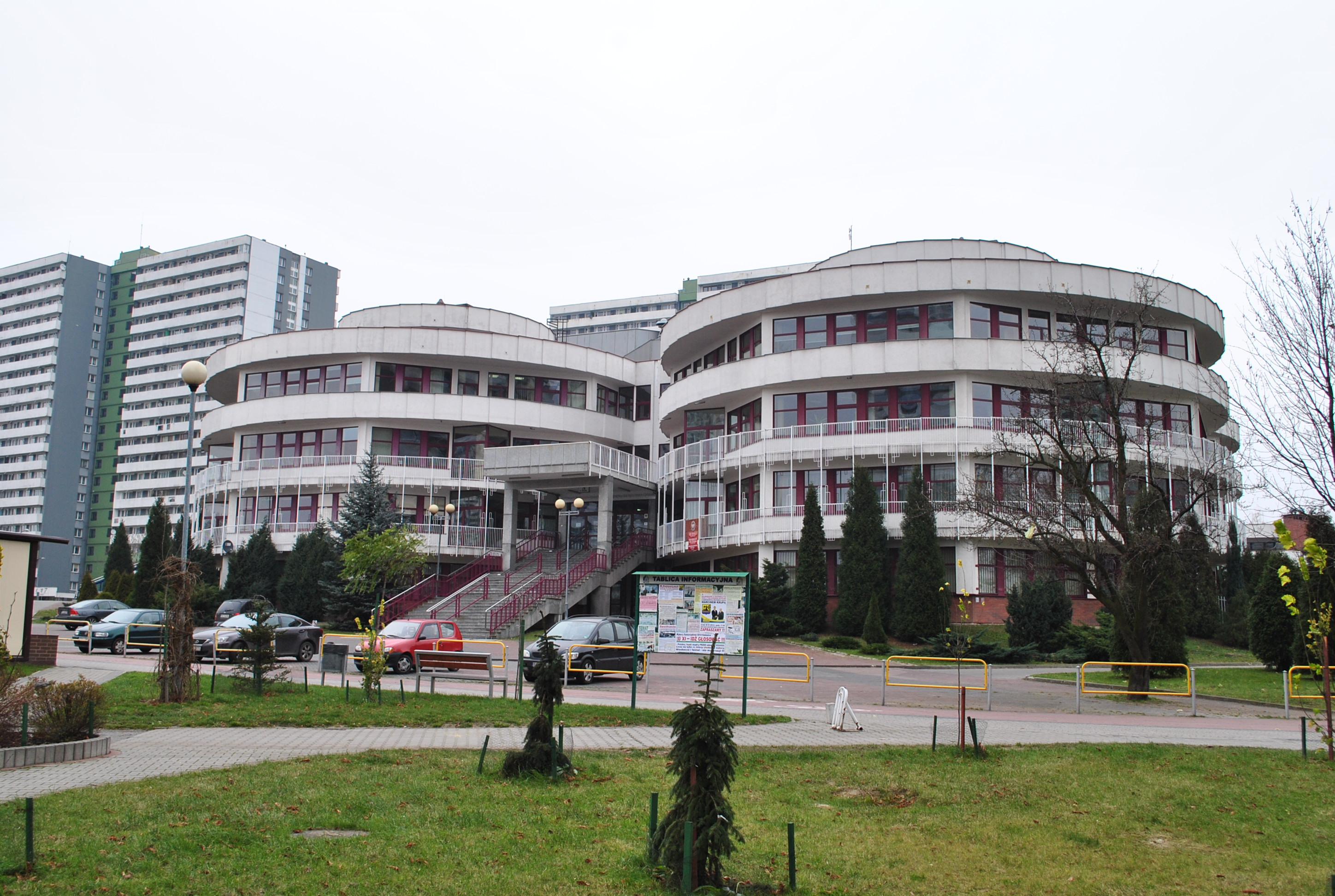 Katowice, Osiedle Tysiąclecia. Zespół Szkół Plastycznych